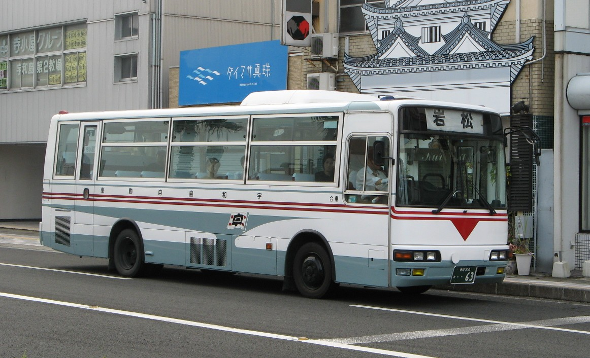 宇和島自動車63 一般乗合バス用